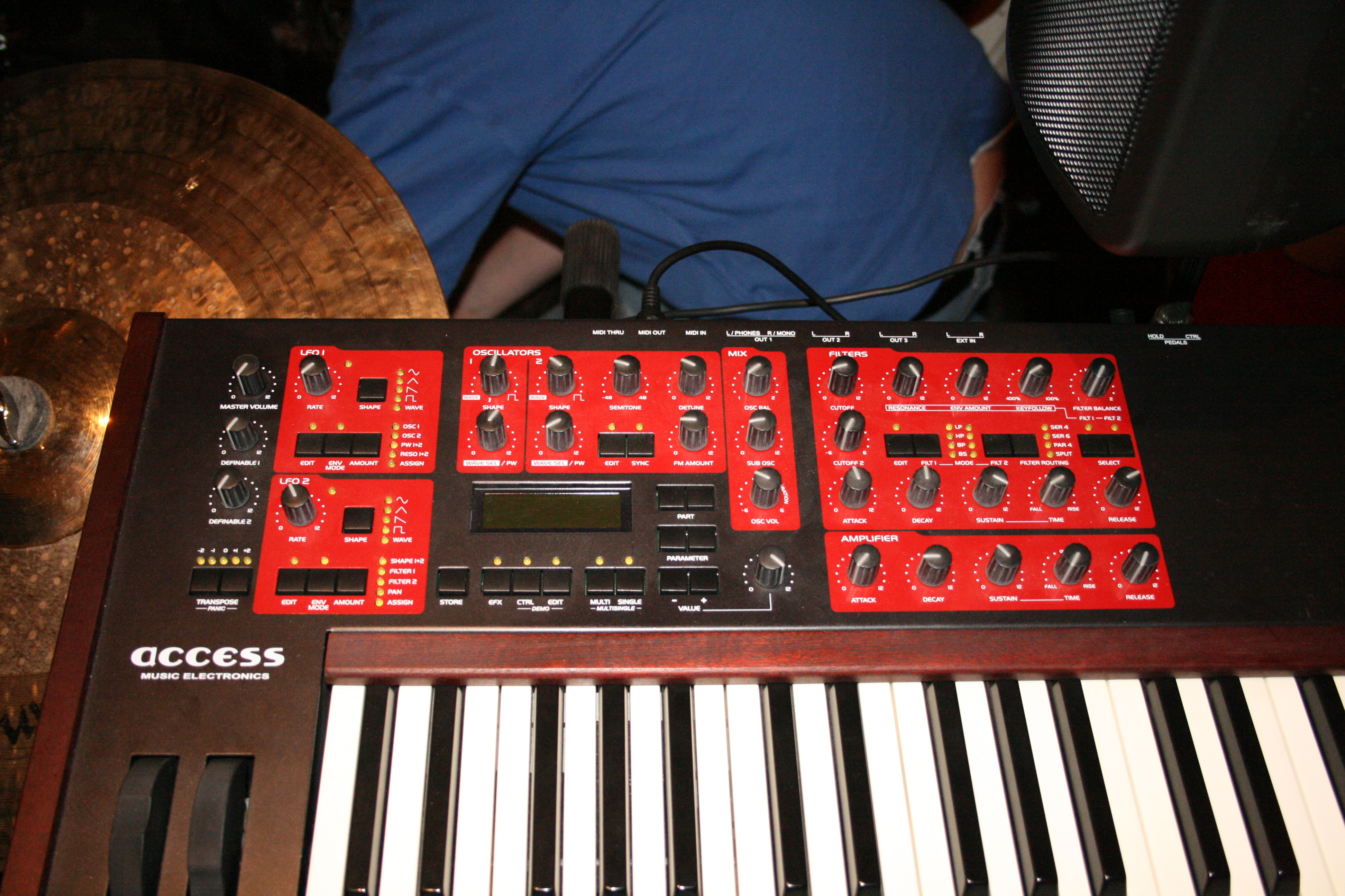 Access Virus KB (partial) Pilotshop live @ Schussel, Braunschweig Mein Arbeitsplatz Vor dem Auftritt, Soundcheck 24 April 2008